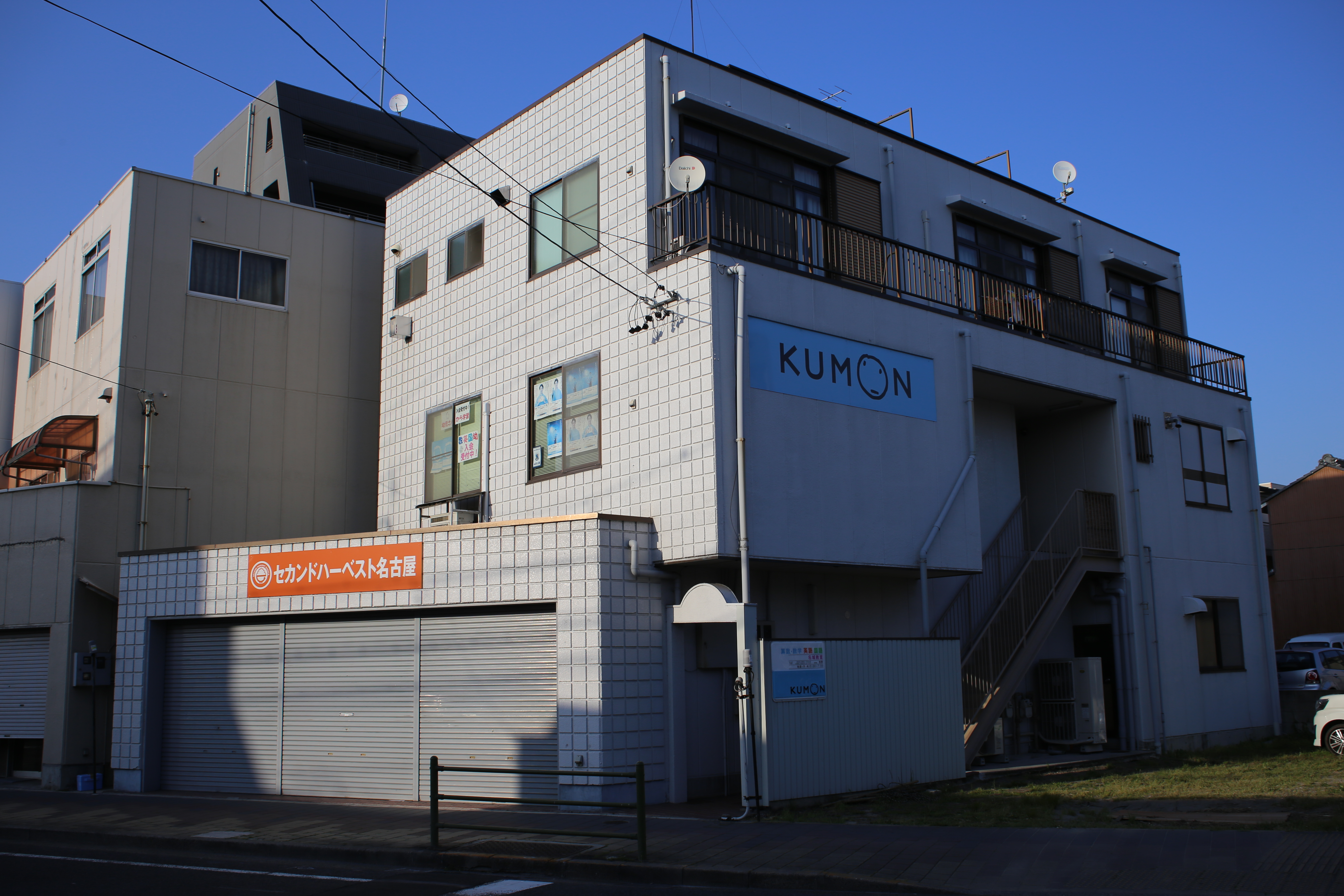 名古屋市北区柳原のセカンドハーベスト名古屋を西側公道南側より撮影